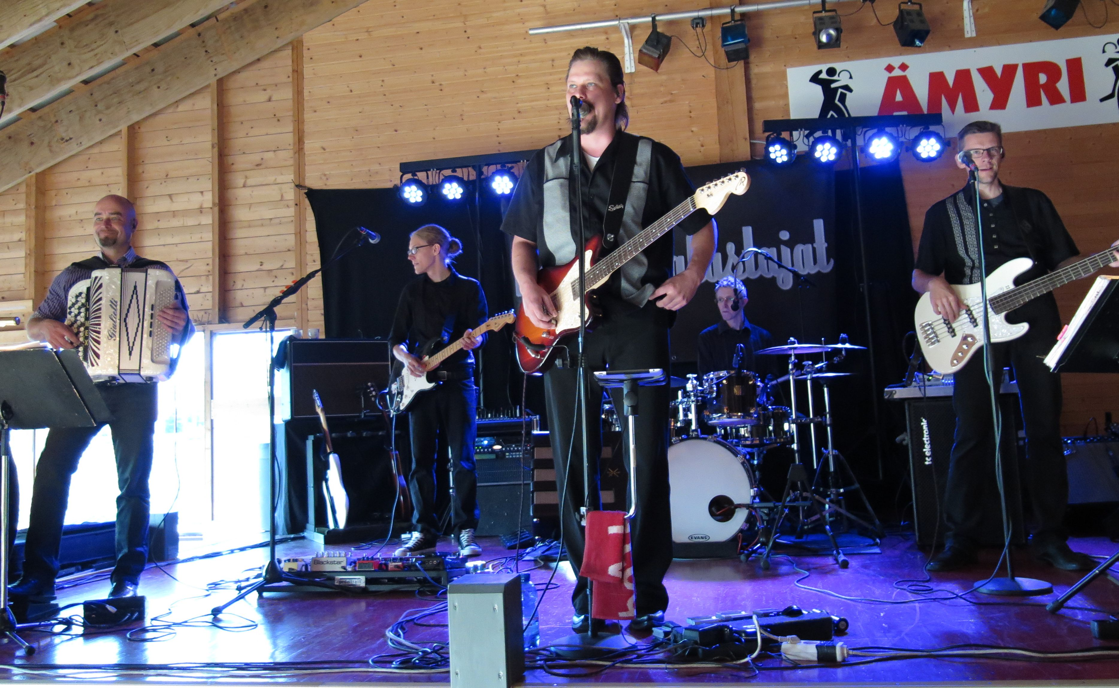 Helmenkalastajat suomalainen tanssiyhtye